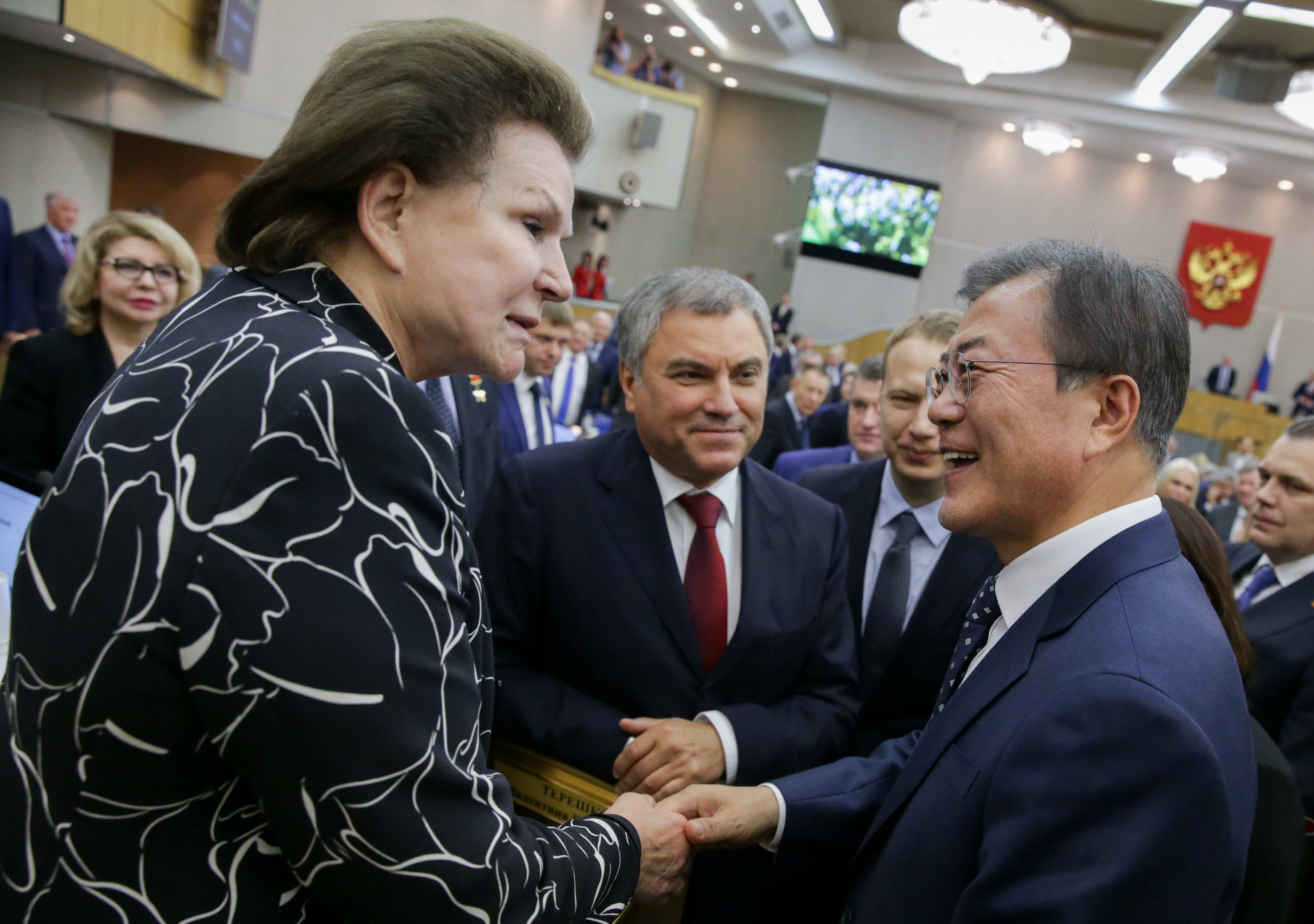 Moon Jae-in in the Russian State Duma (2018-06-21)